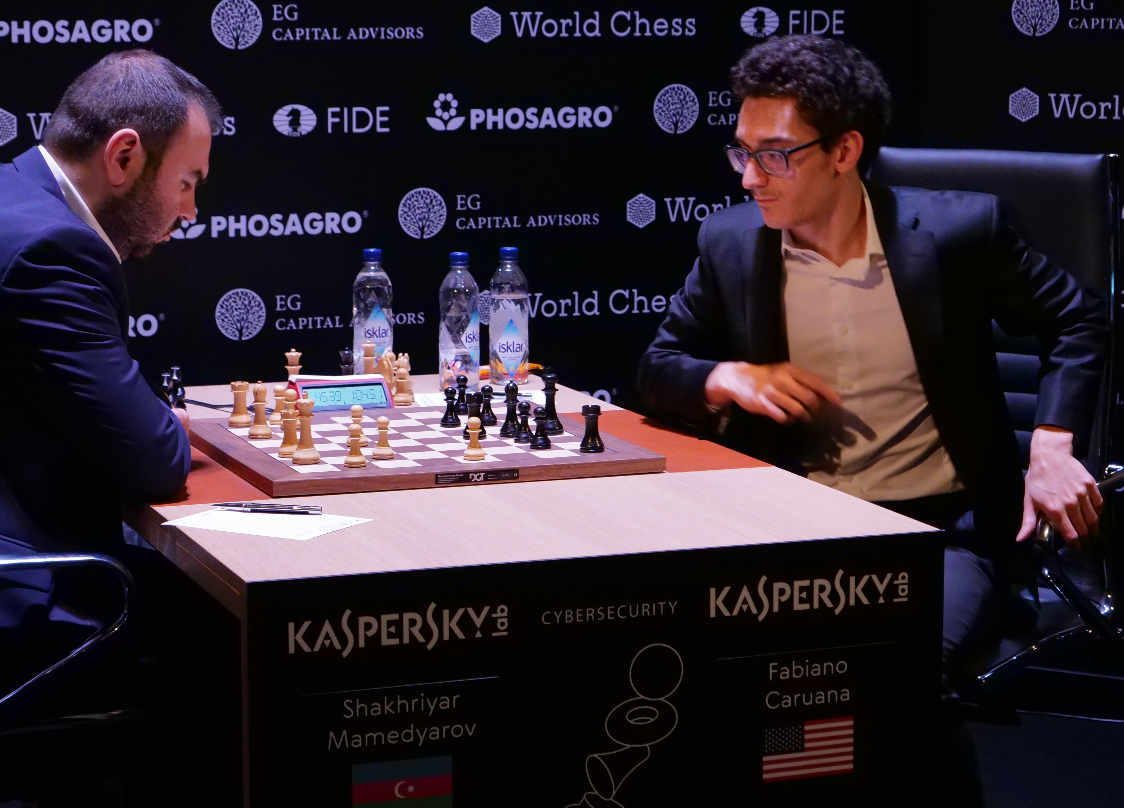 Şəhriyar Məmmədyarov (li.) und Fabiano Caruana, Kandidatenturnier Berlin 2018, 10. Runde